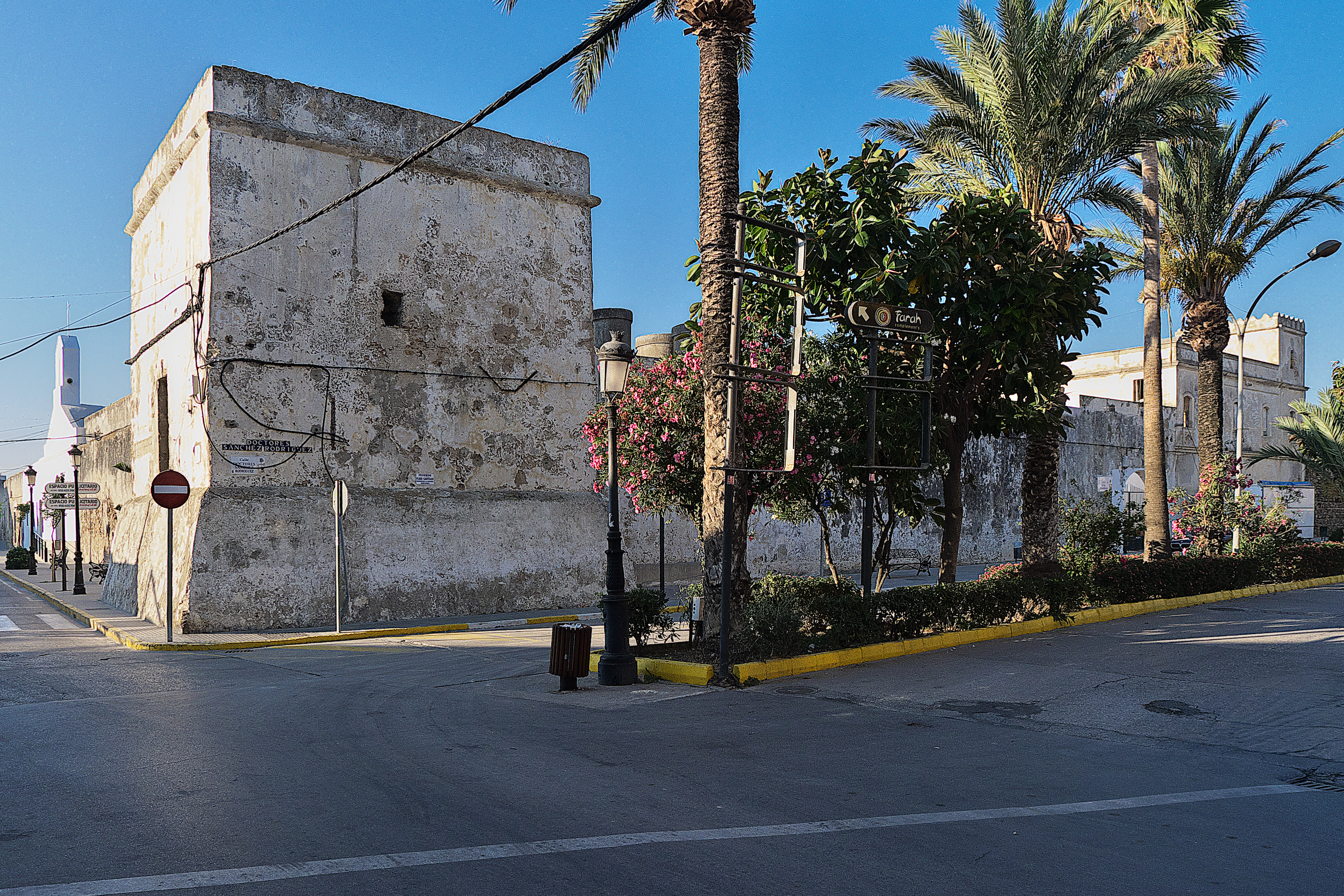 Los Duques de Medina Sidonia construyen esta fortaleza para defender la zona de la piratería turco-berberisca.